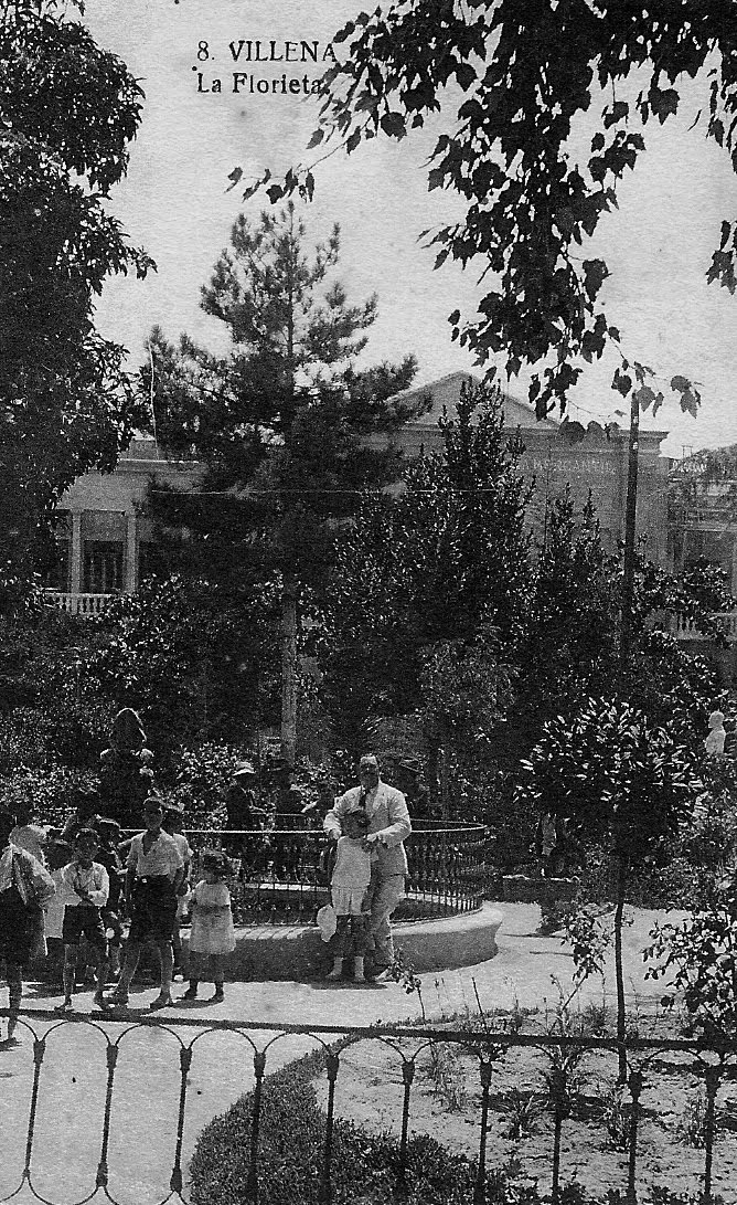 Parterre del Paseo Chapí de Villena, donde puede observarse la escultura de La Rana, en lugar del Monumento al compositor, que se instalaría en 1948.